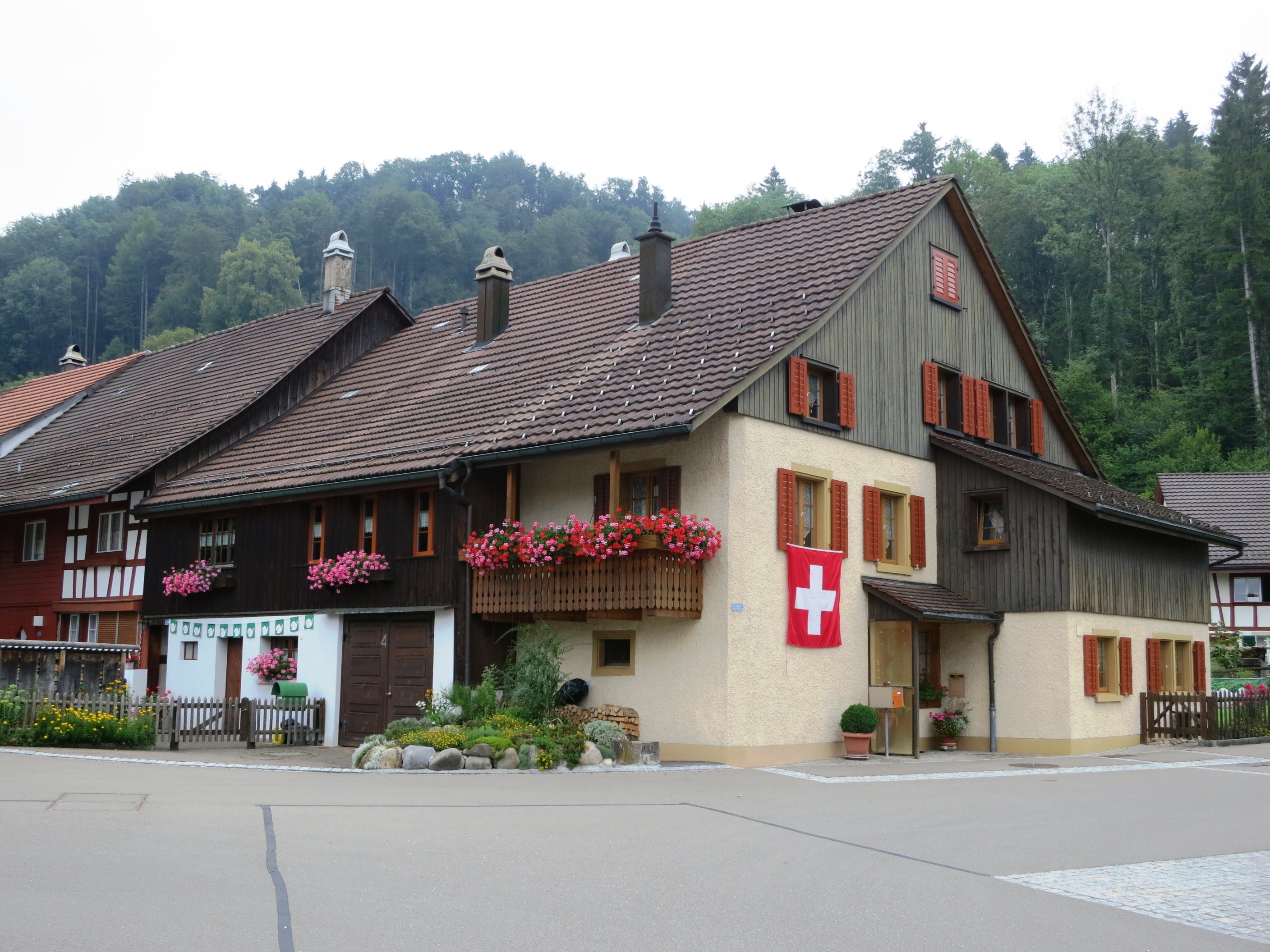 Wohnhaus, Zell ZH, Schweiz